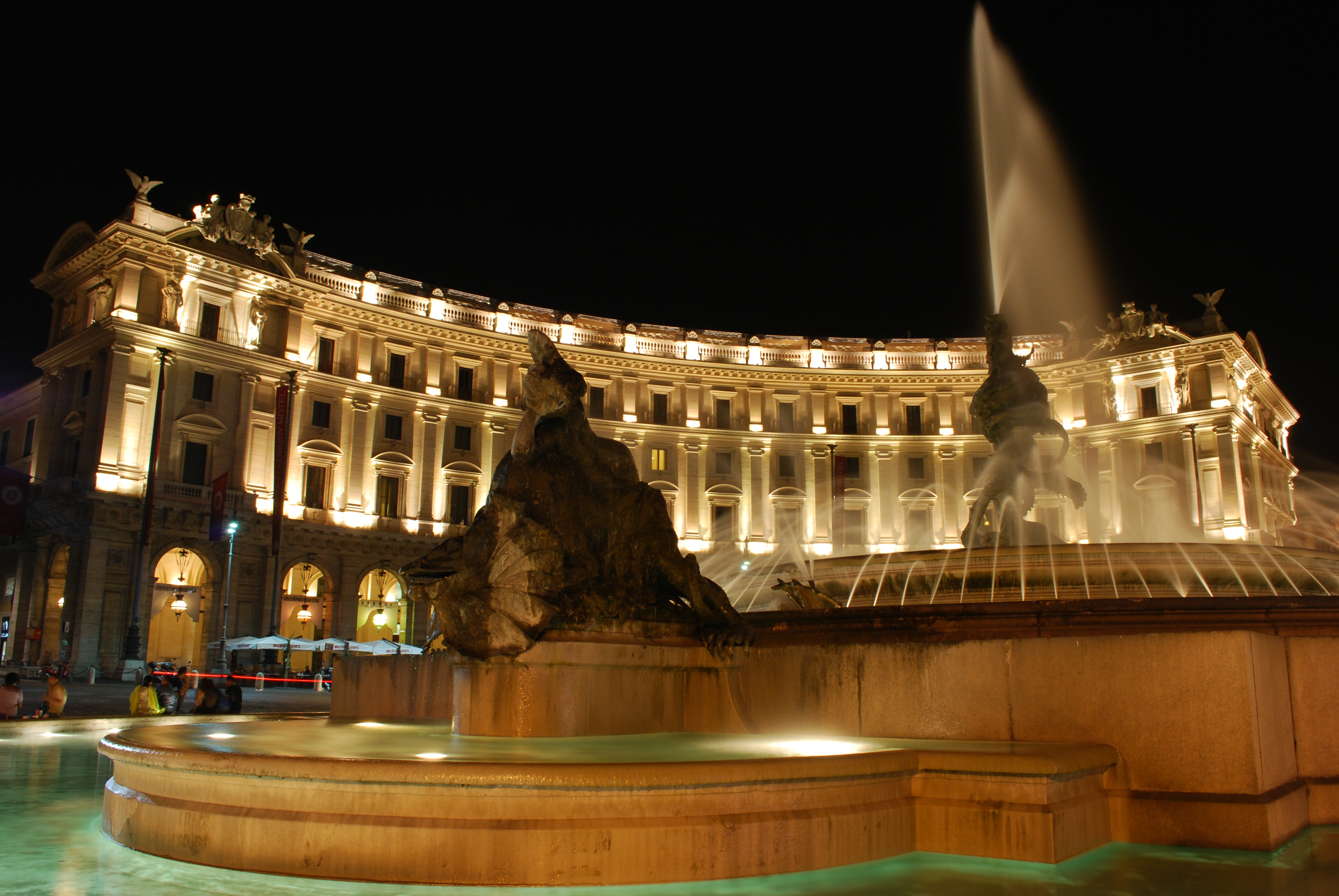 Fontana della Naiadi di notte